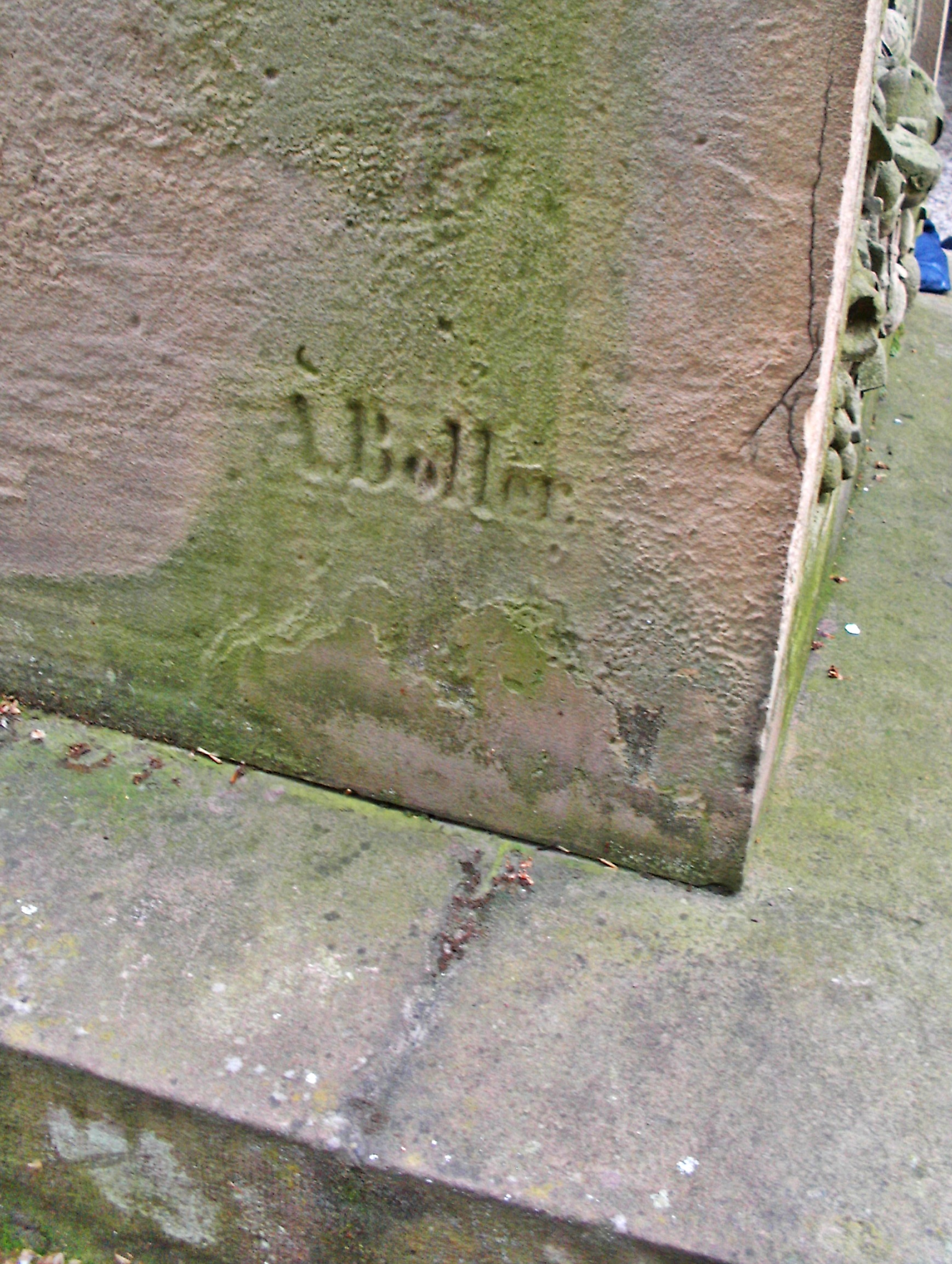 Aloys Boller (1825-1882), Bildhauer Worms, Signatur, Napoleonsveteranen-Denkmal Worms